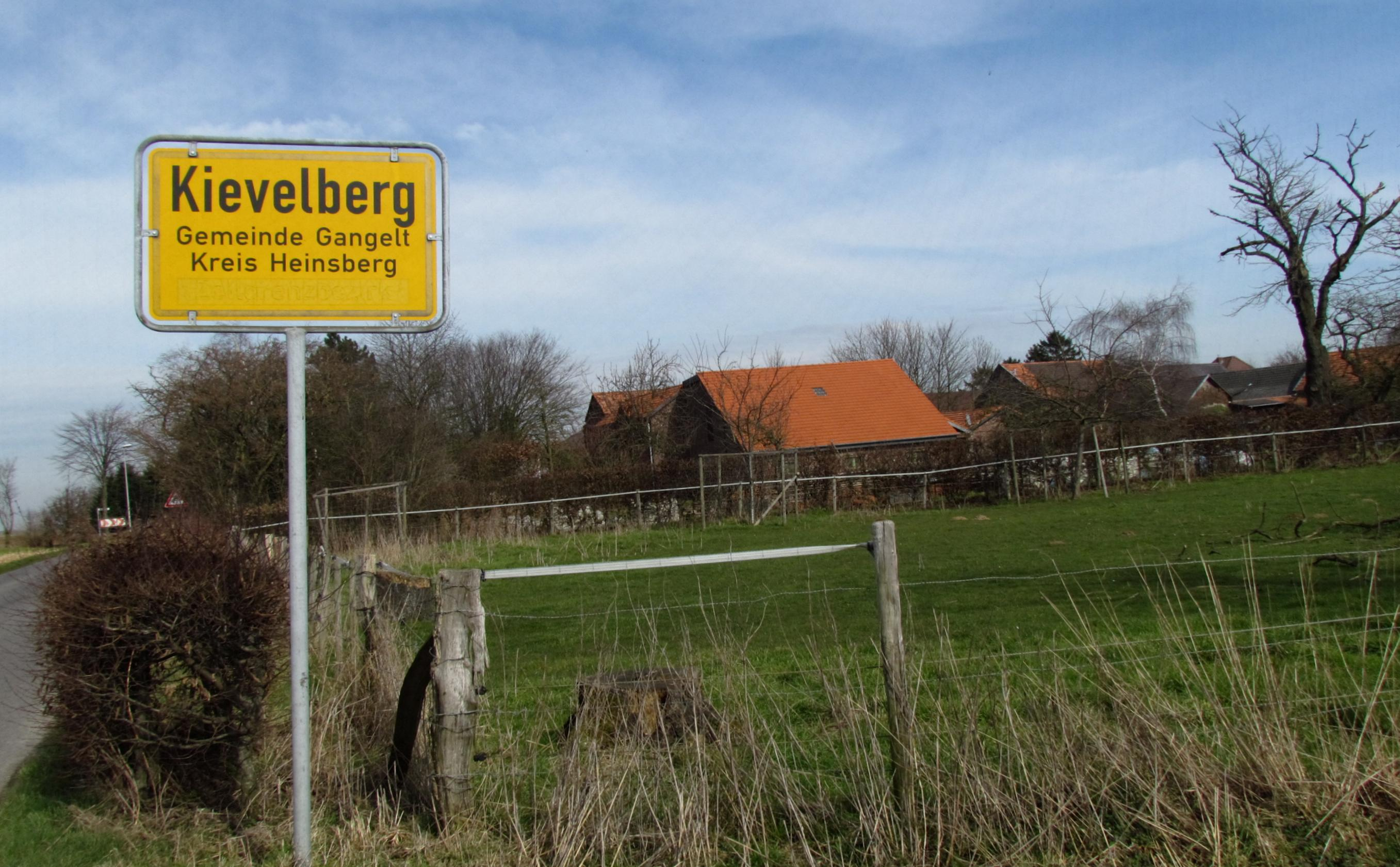 Ortseingang von Kievelberg